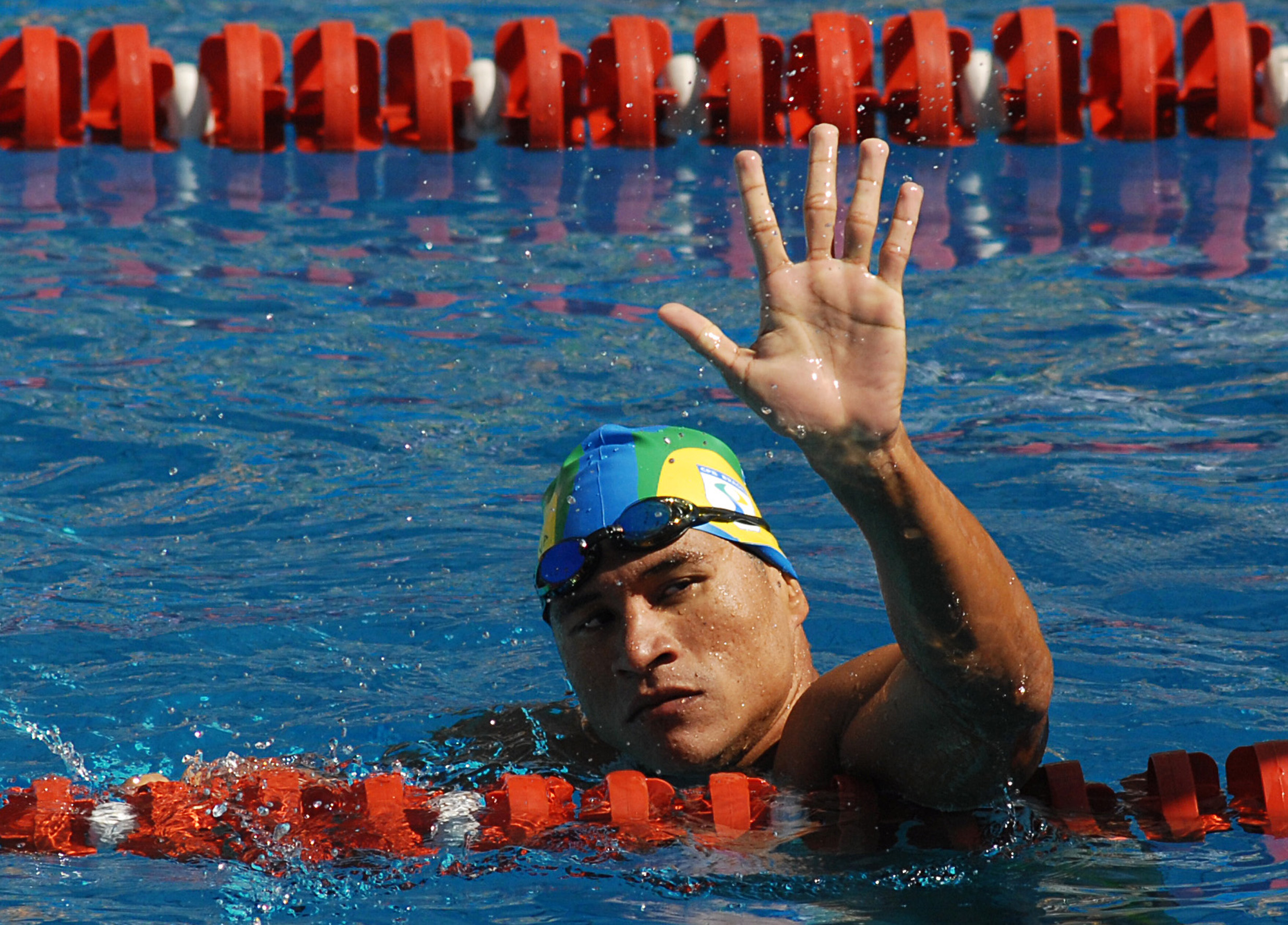 Rio de Janeiro - O nadador Clodoaldo Silva bate novo recorde nos 150 metros medley, nos Jogos Parapan-Americanos 2007